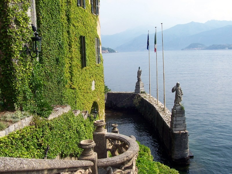 Lenno - Imbarcadero di Villa del Balbianello